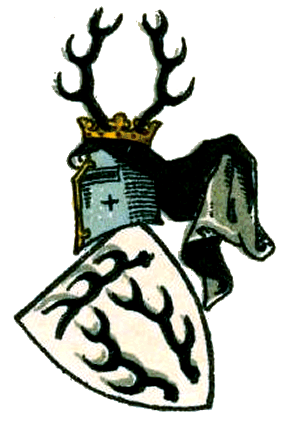 Wappen derer von Schlichting